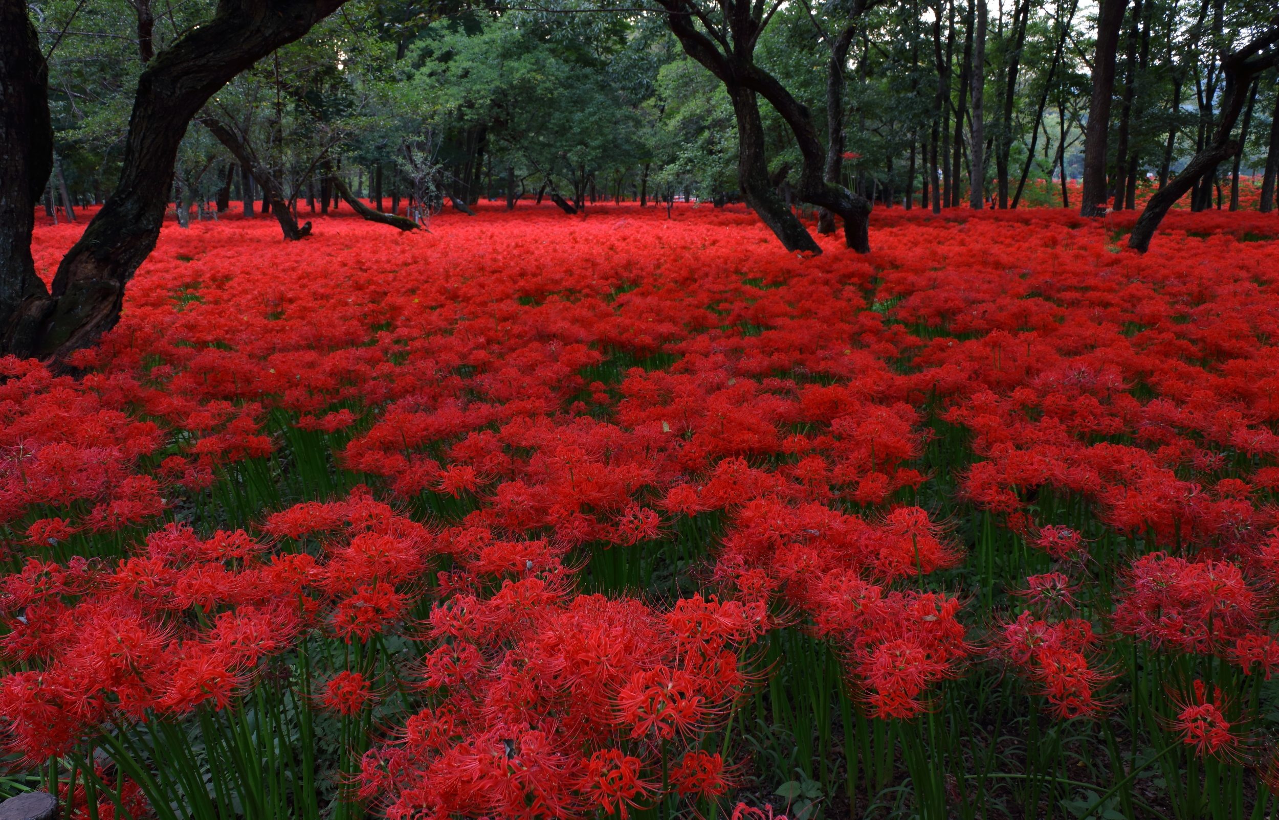 彼岸花（曼珠沙華）- 埼玉県日高市「巾着田」